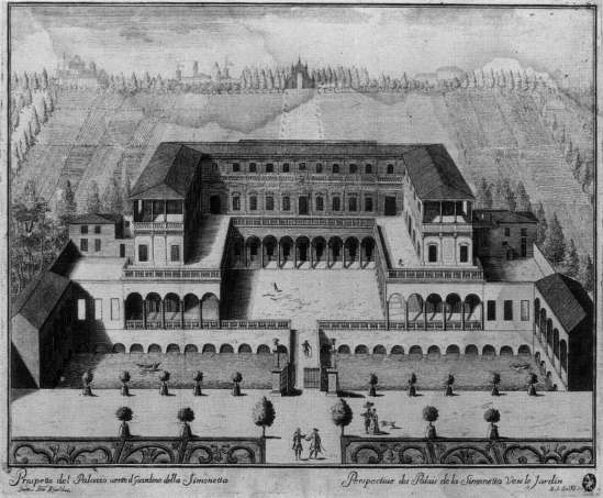 Marc'Antonio Dal Re (1697-1766), Prospetto del Palazzo verso il giardino della Simonetta. Incisione da Ville di delizia o siano palagi camparecci nello Stato di Milano, Milano, 1726.